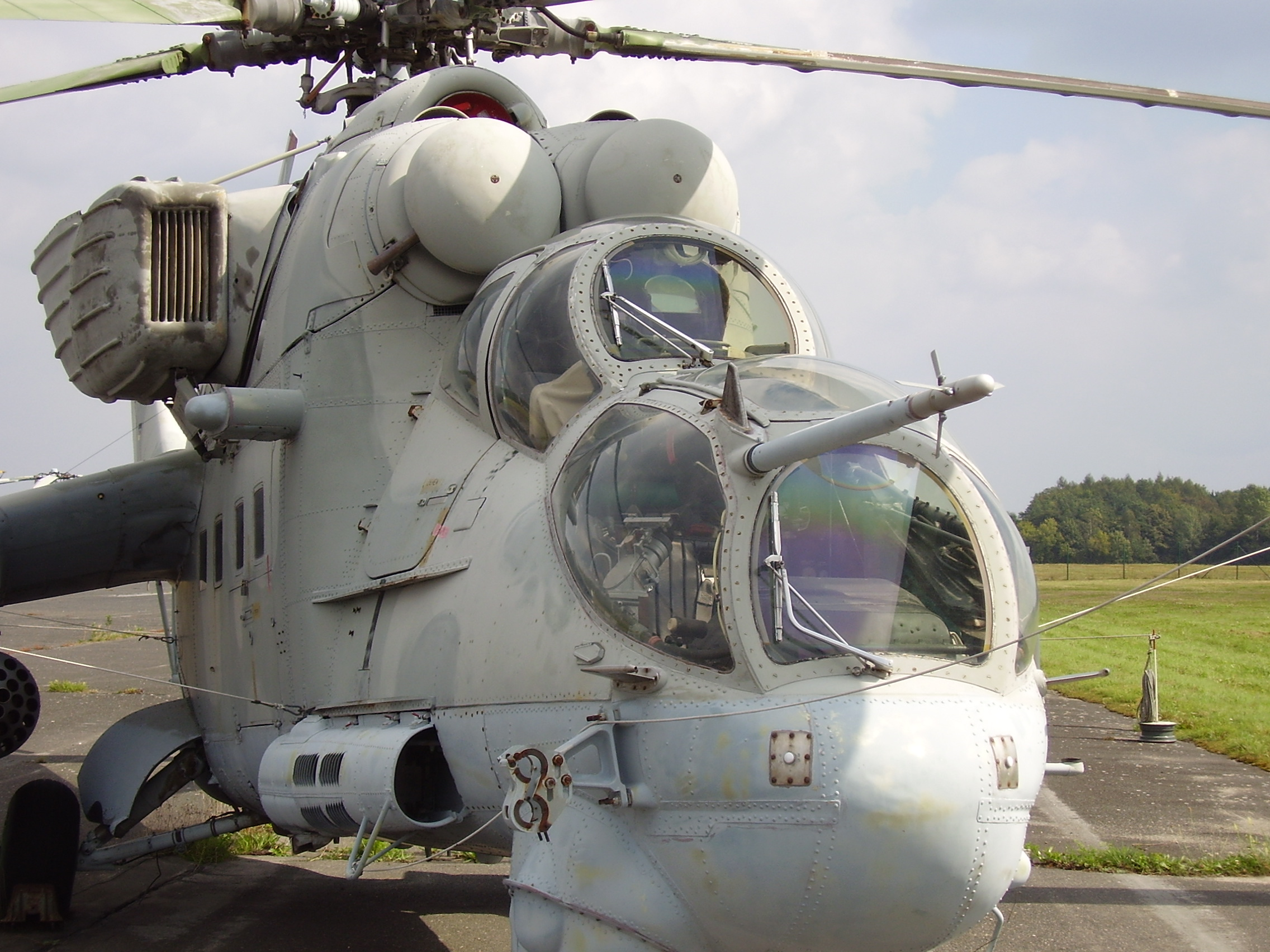 Luftwaffenmuseum der Bundeswehr; Airforce Museum of the Bundeswehr; Berlin-Gatow,Mi-25P